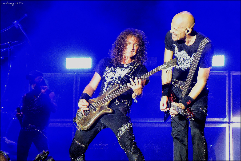 Accept, live RockFest Barcelona, 25/7/2015